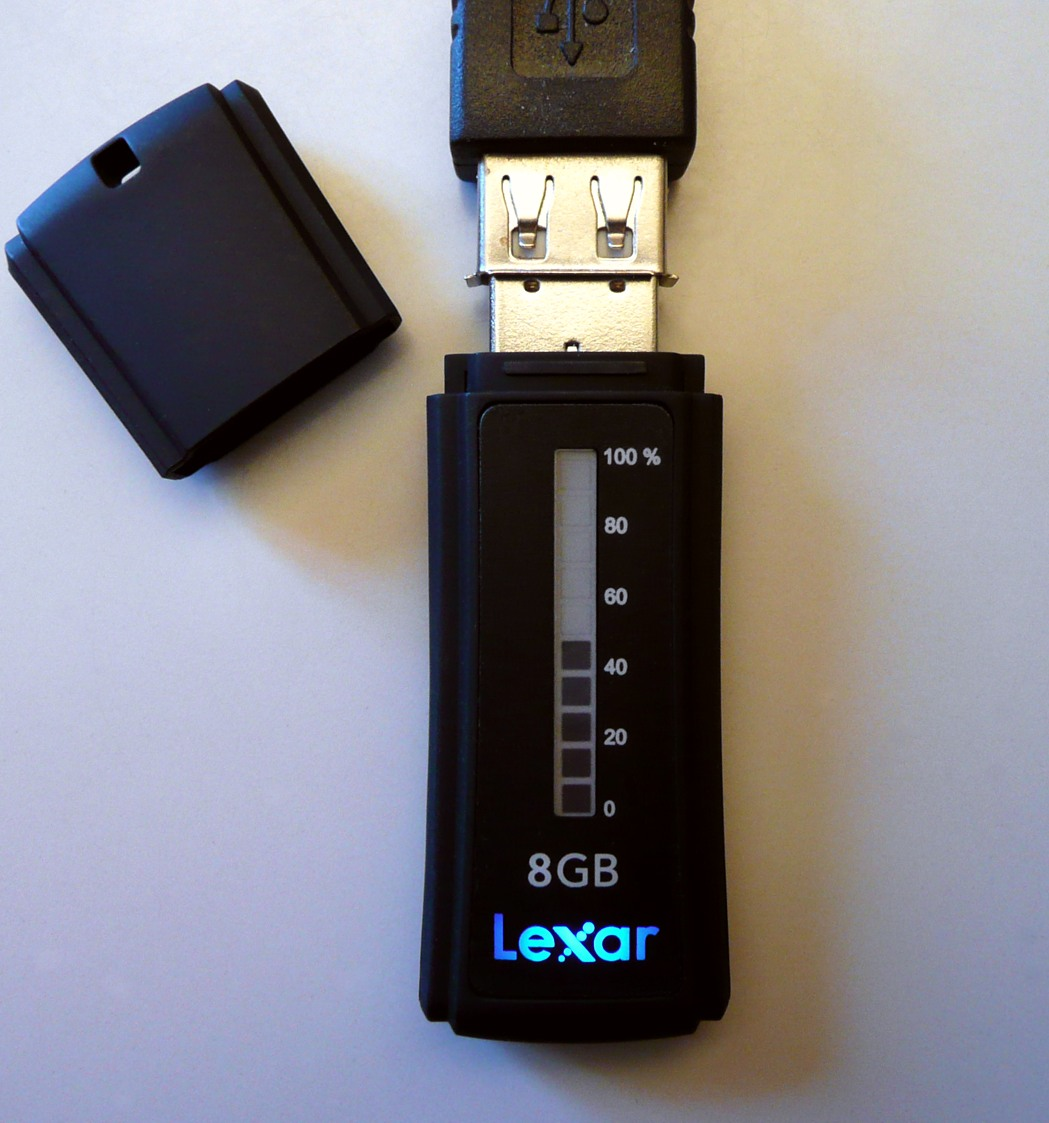 Memory-Stick Lexar Jumpdrive Secure II Plus